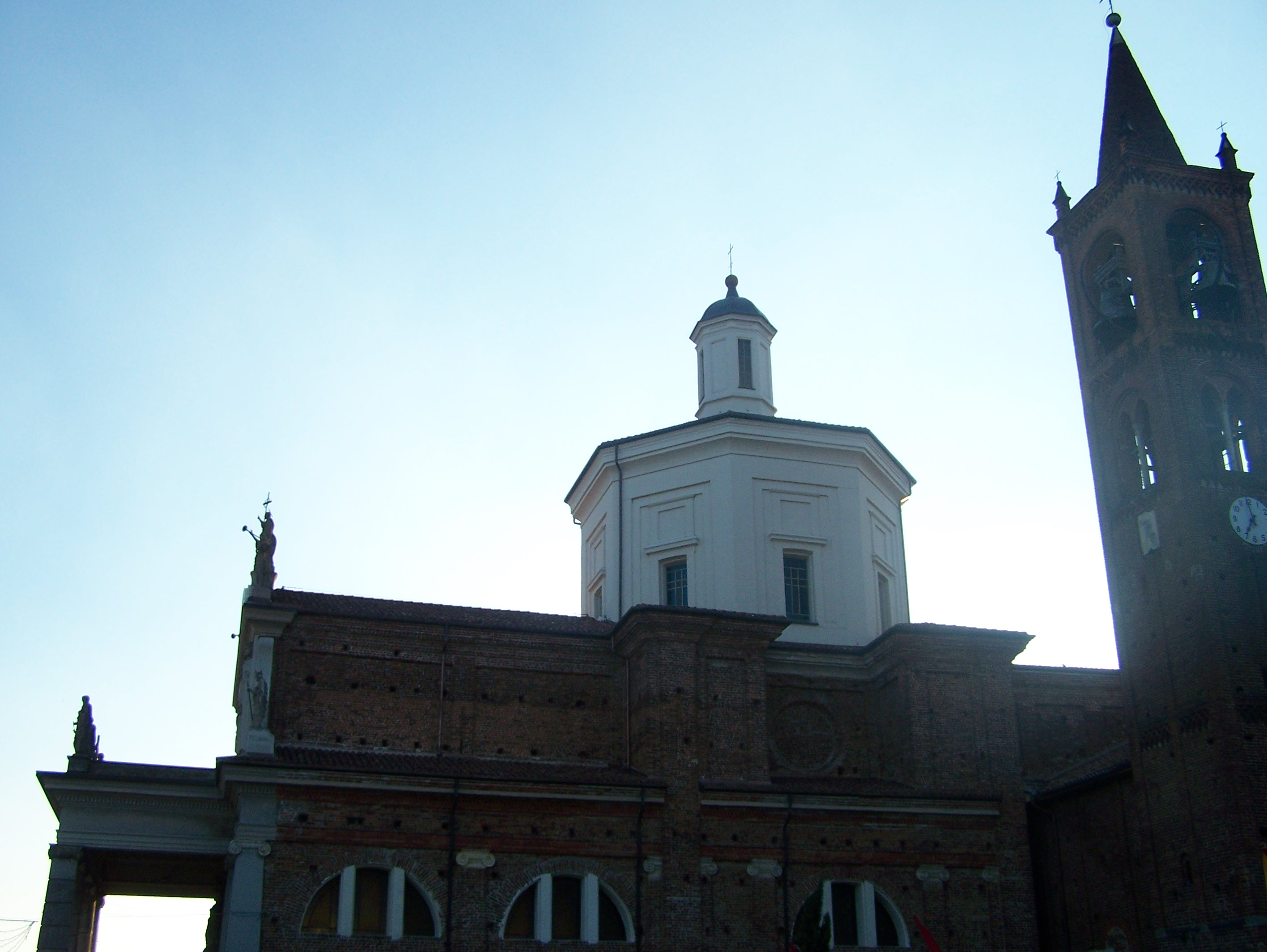 Parrocchia di San Giorgio a Bernate Ticino (MI) - Italy